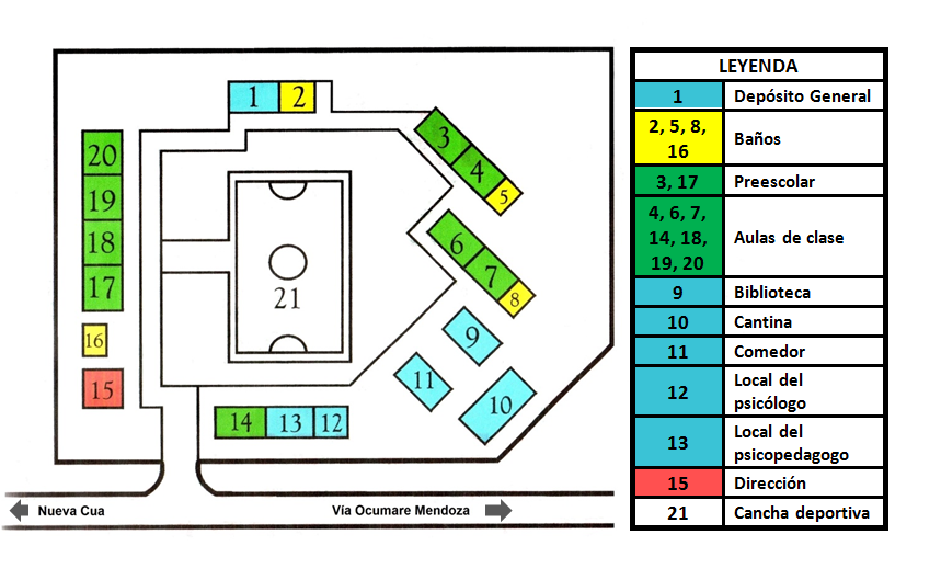 Cancha Deportiva de la Unidad Educativa Estadal José Gil Fortoul